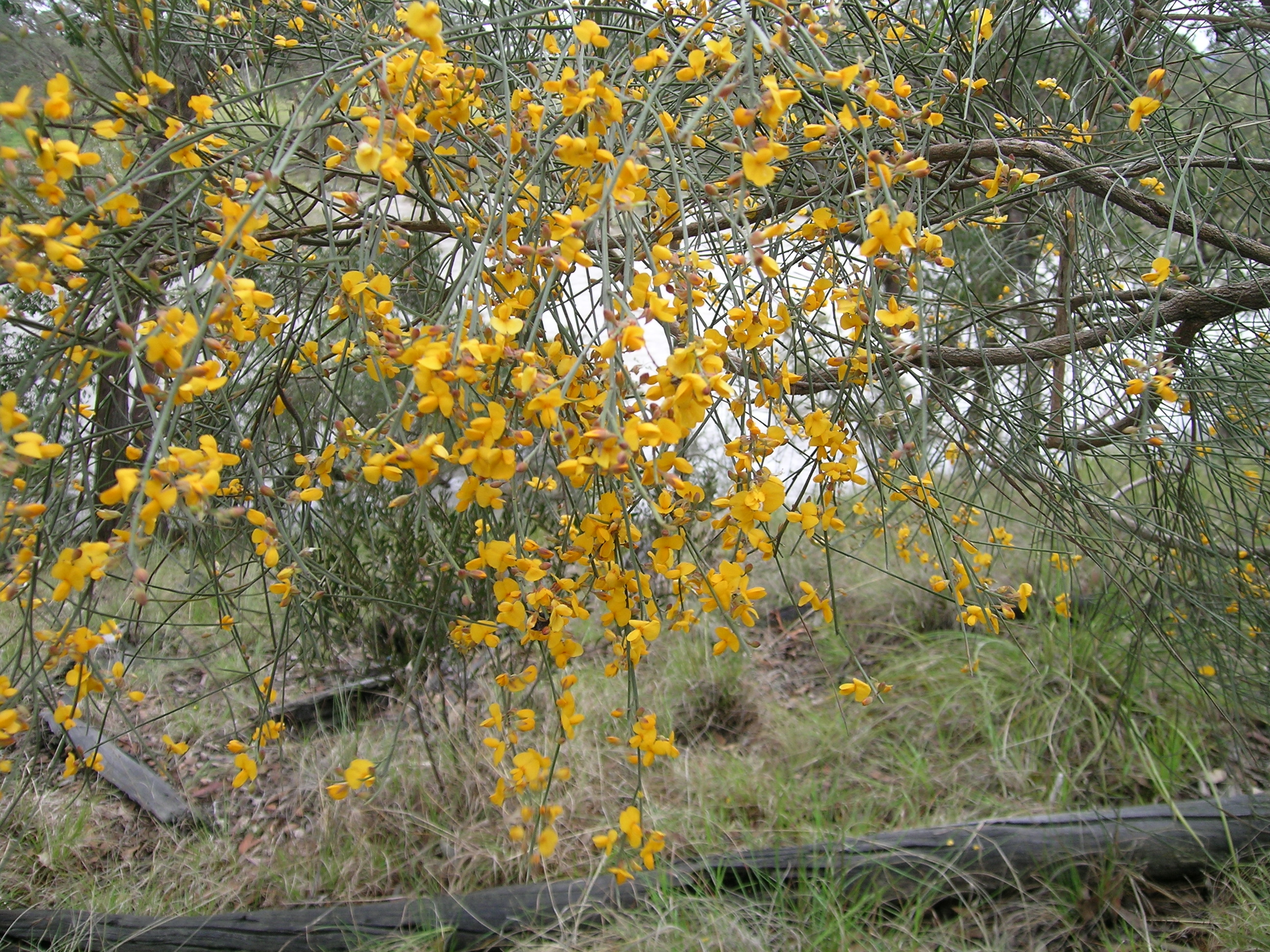 Jacksonia scoparia (Dogwood)